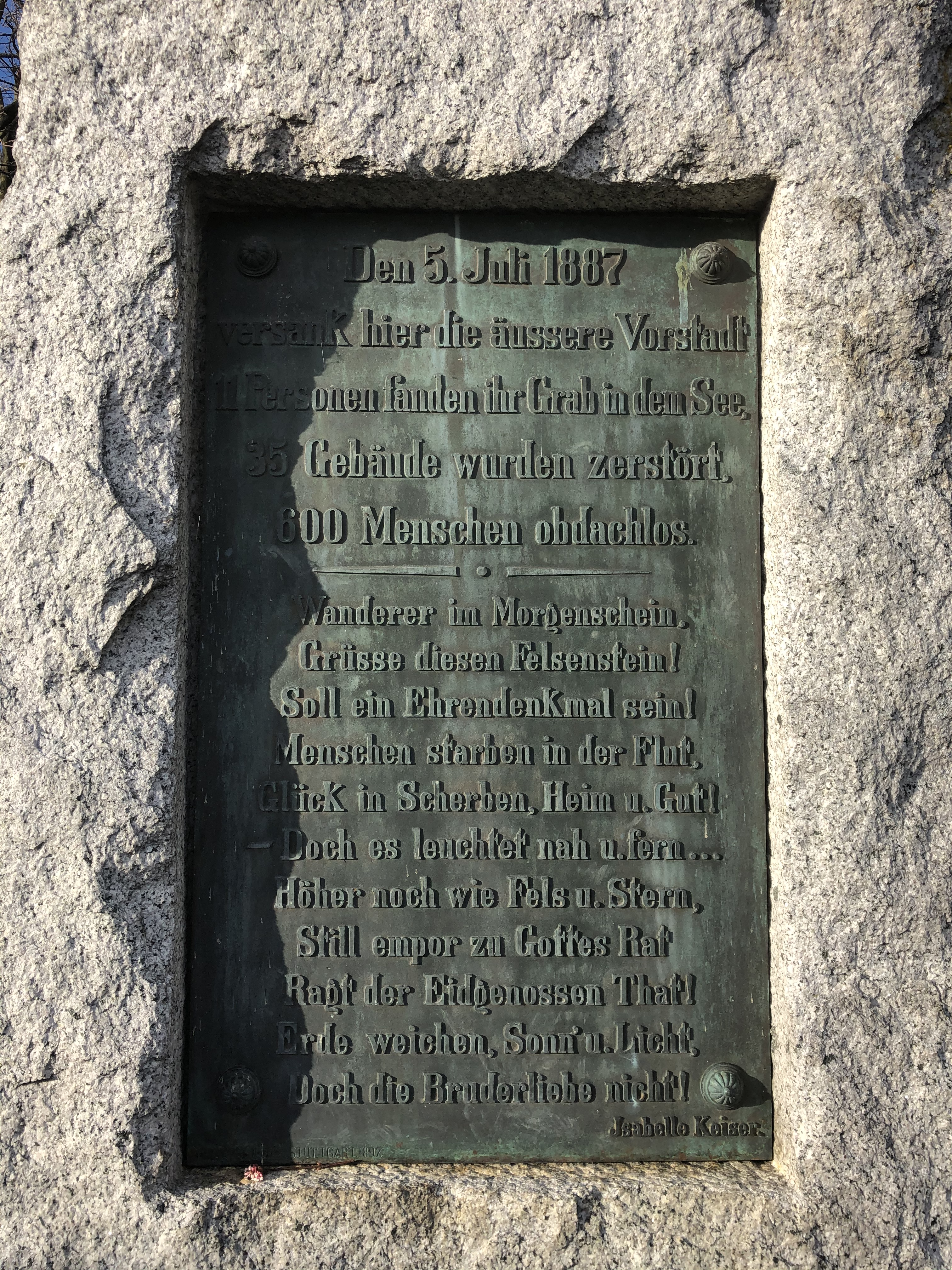 Infotafel am Haus «zur Spindel» in Zug, wo die Zuger Kirschtorte erfunden wurde